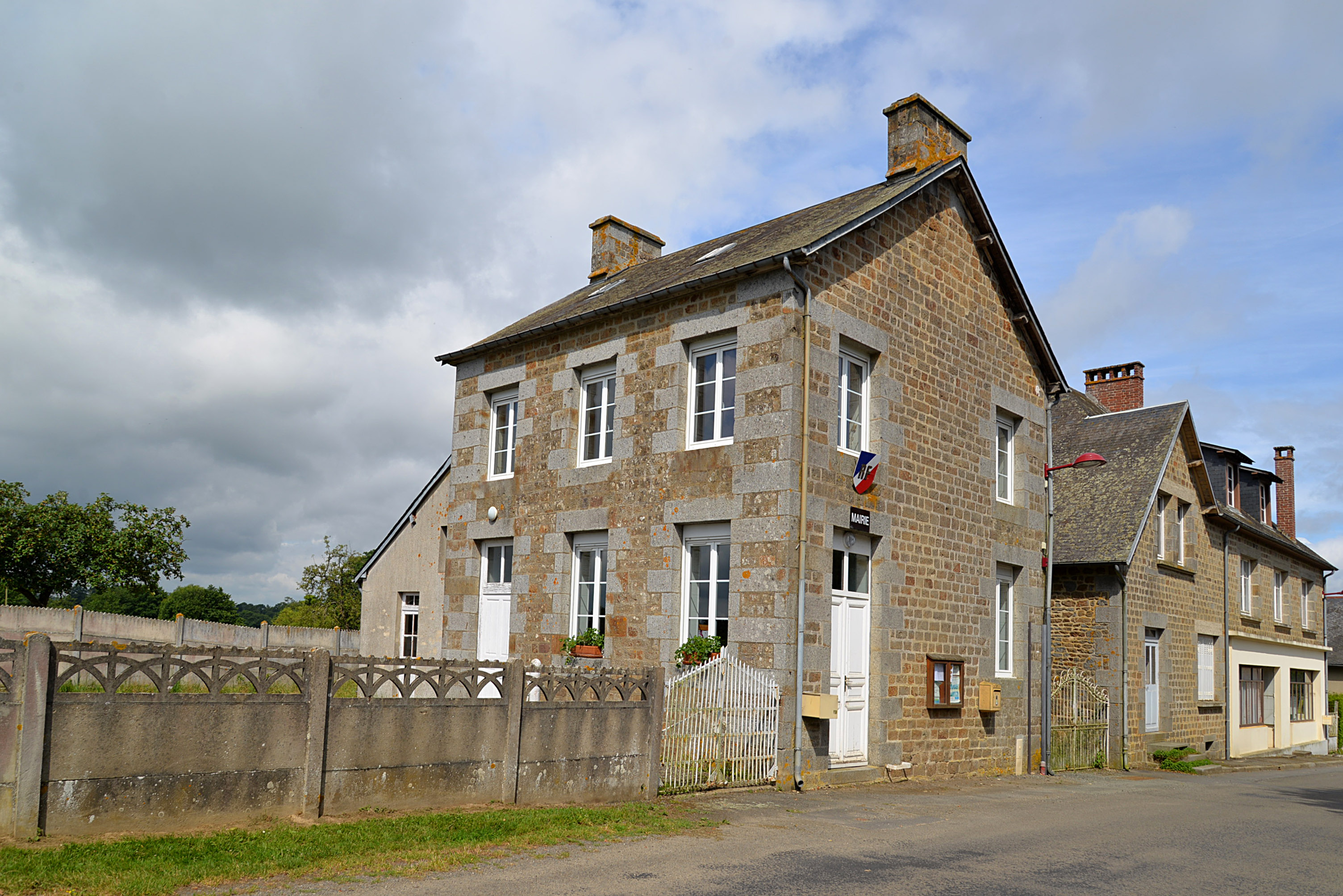 Faverolles (Orne)